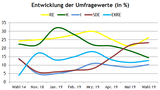 Europawahl 2019 Estland Umfragen